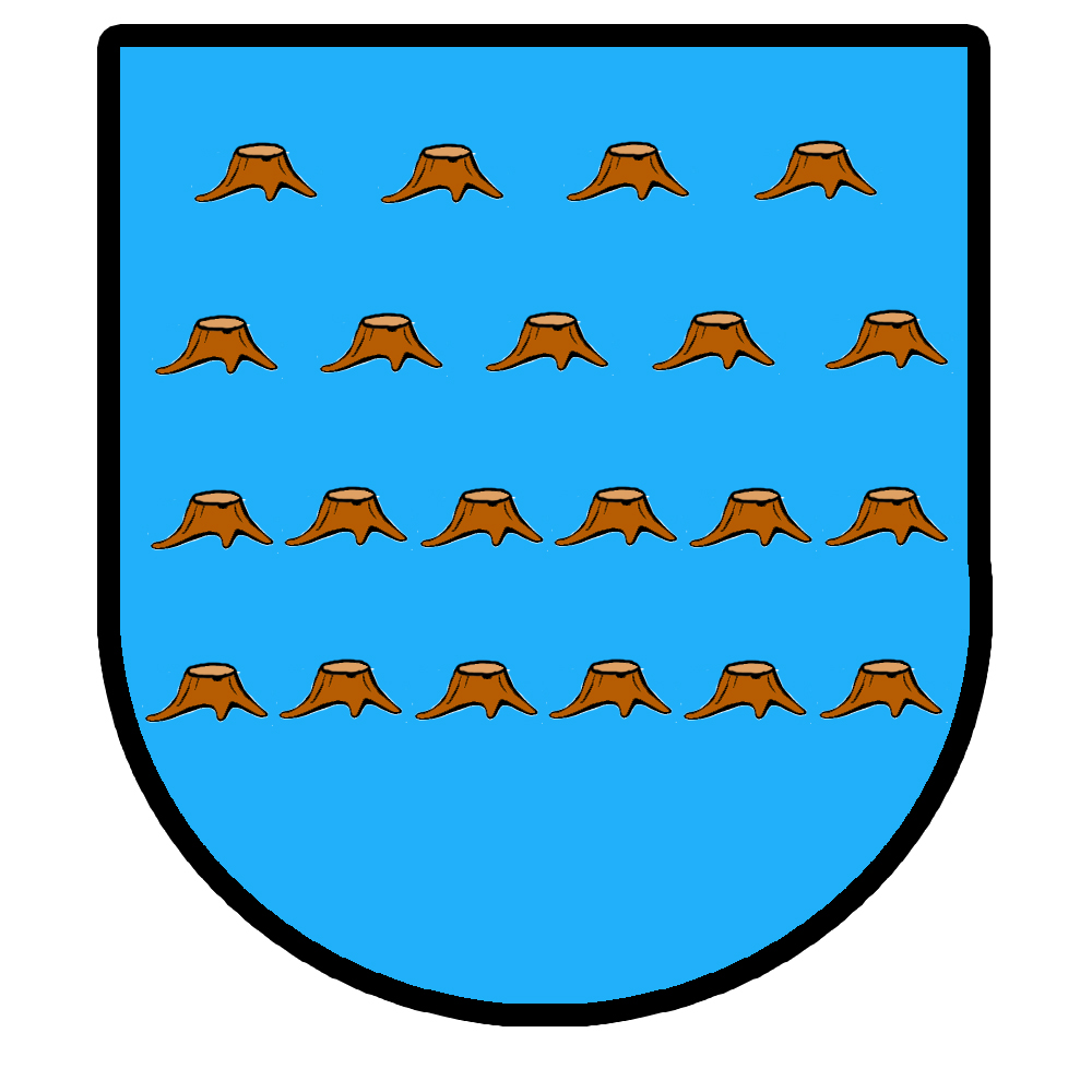 Herb sołectwa Poręba (powiat Pszczyński)